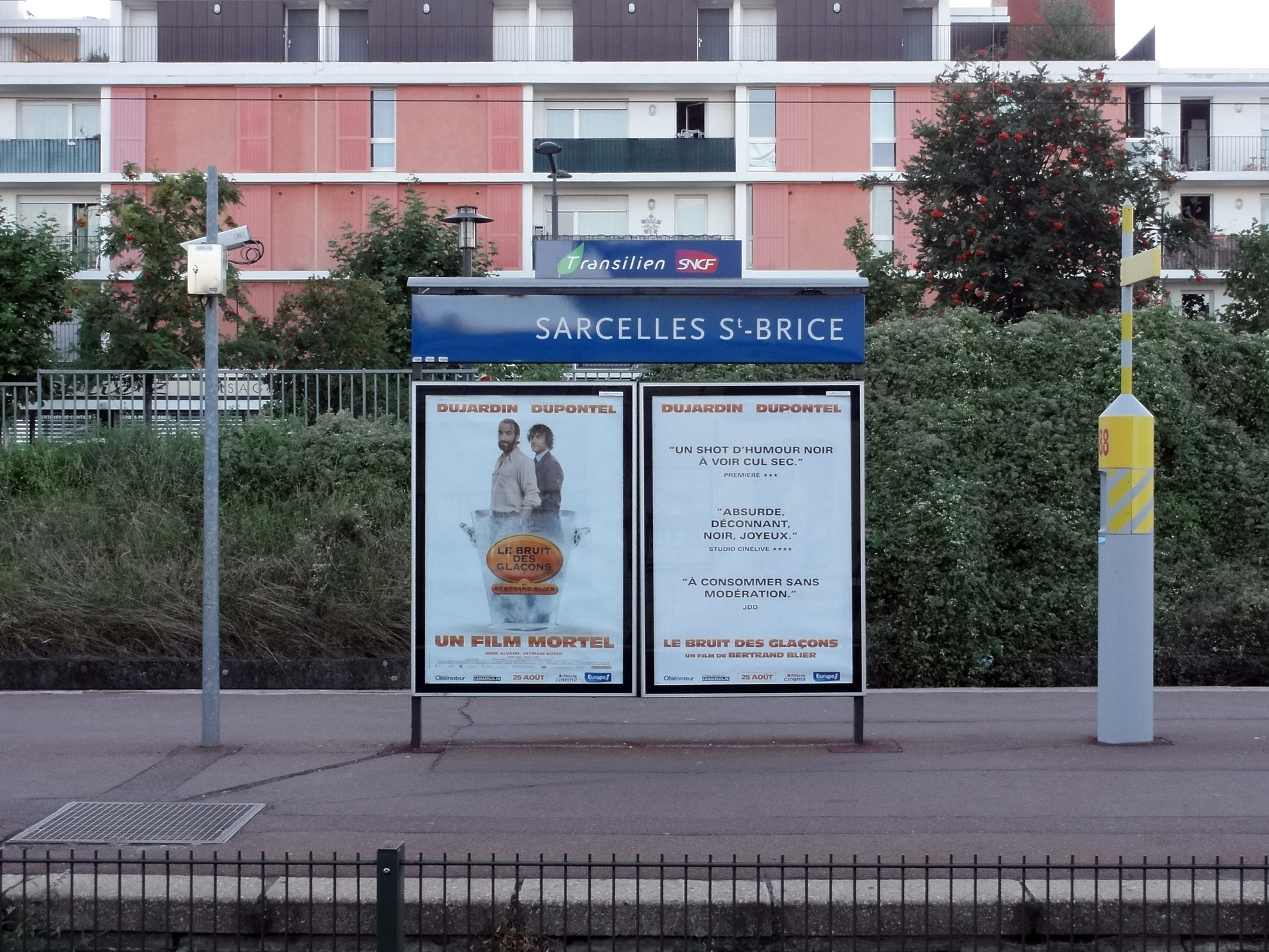 La gare de Sarcelles - Saint-Brice, Val-d'Oise, France.